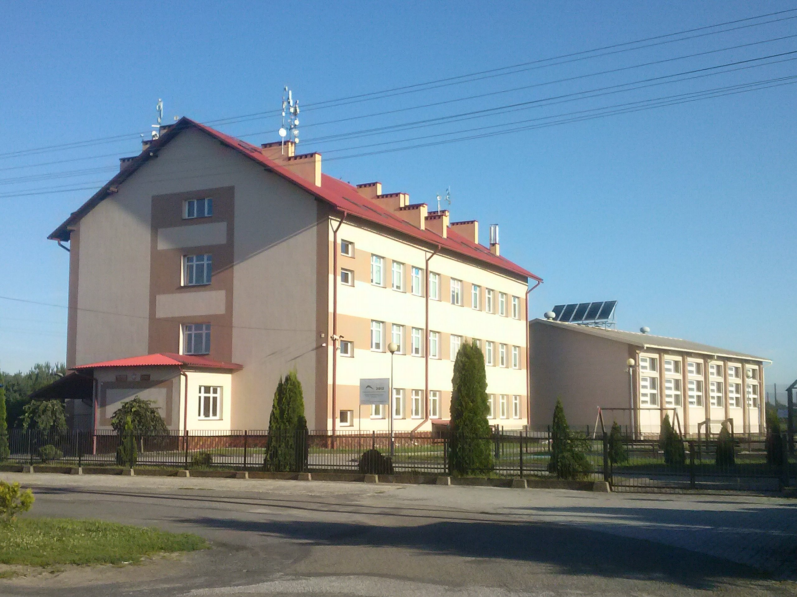 Szkoła Podstawowa im. Sługi Bożego Kardynała Stefana Wyszyńskiego w Wólce Pełkińskiej